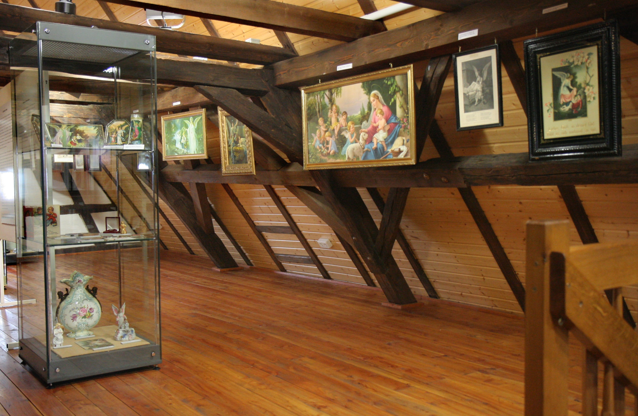 Deutsches Schutzengelmuseum im Schweizer Hof, Engelsberg 9 in Bretten.